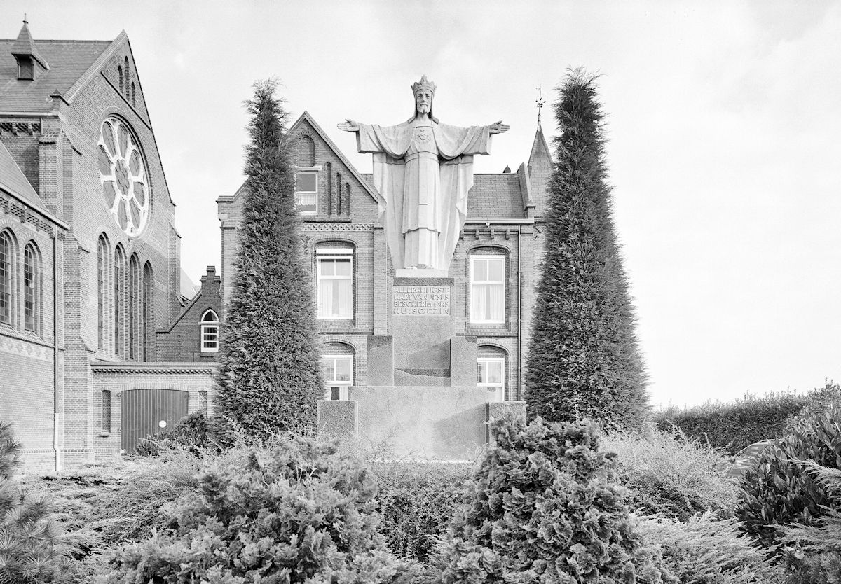 Pastorie R.K. St.- Petrus en Pauluskerk: H.Hartbeeld voor pastorie, (opmerking: Gefotografeerd voor Het Monumentale Hart van Holland)